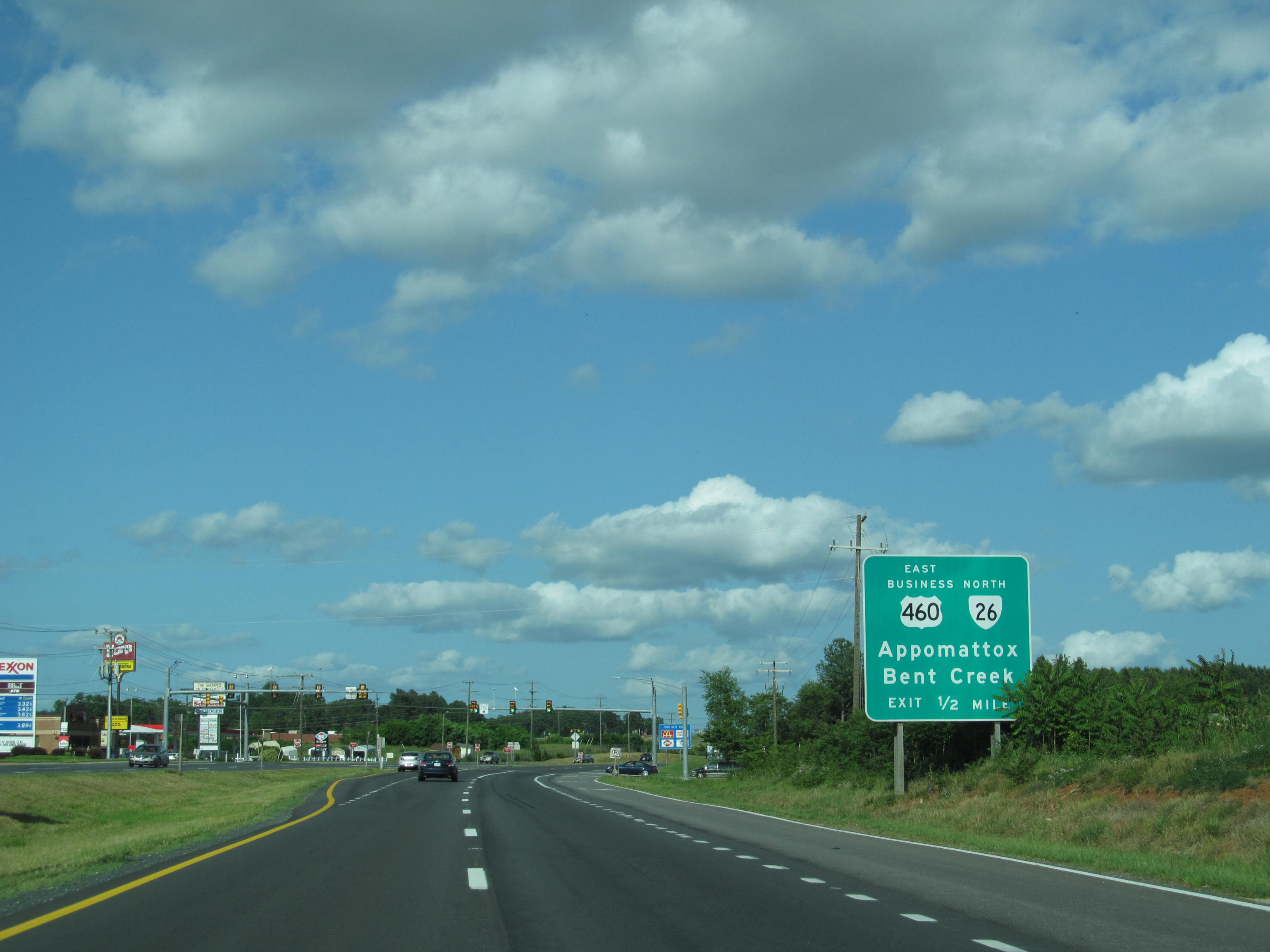 US Route 460 - Virginia